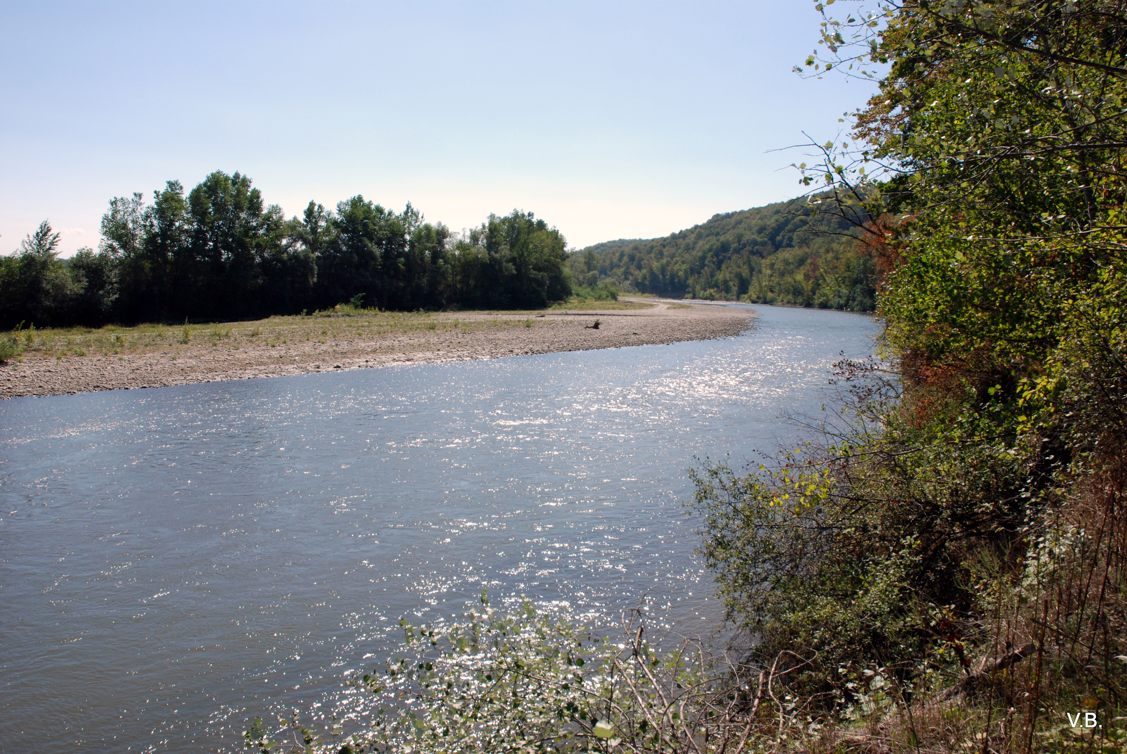 Река Белая. Фото Виктора Белоусова.